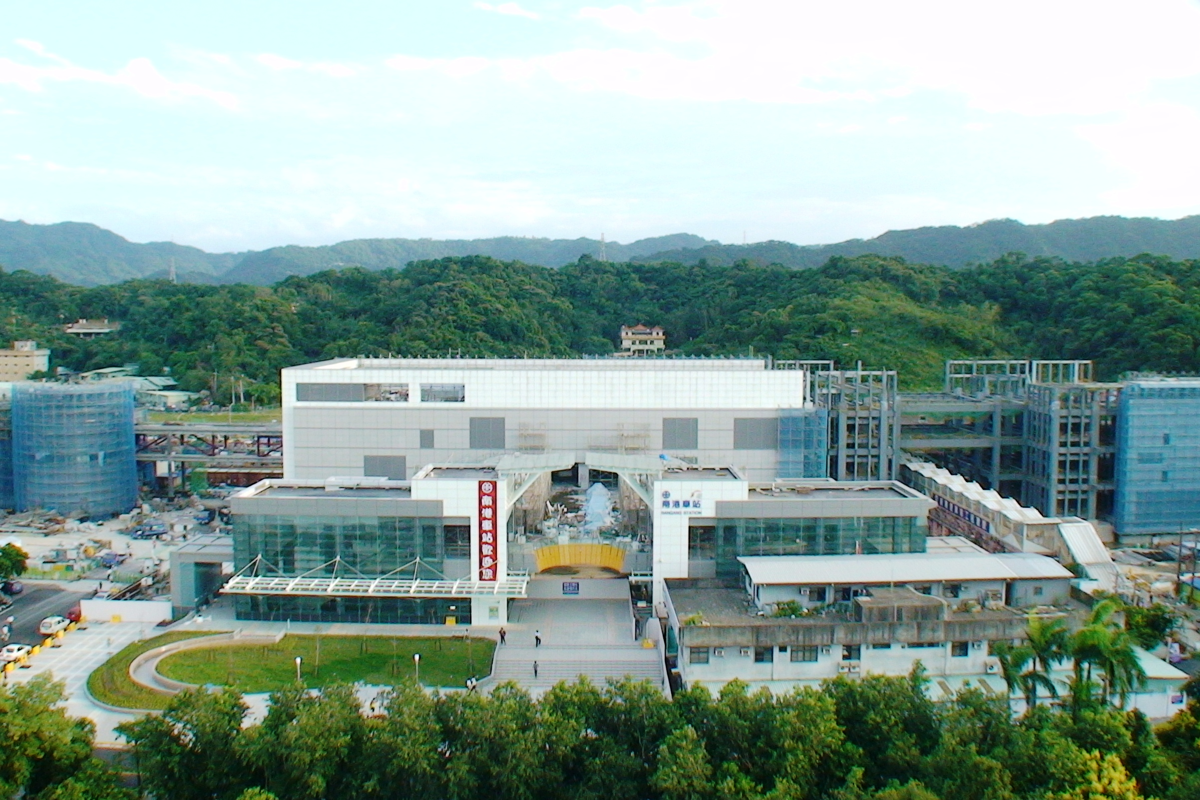 中文（台灣）: 臺北市南港區南港車站。